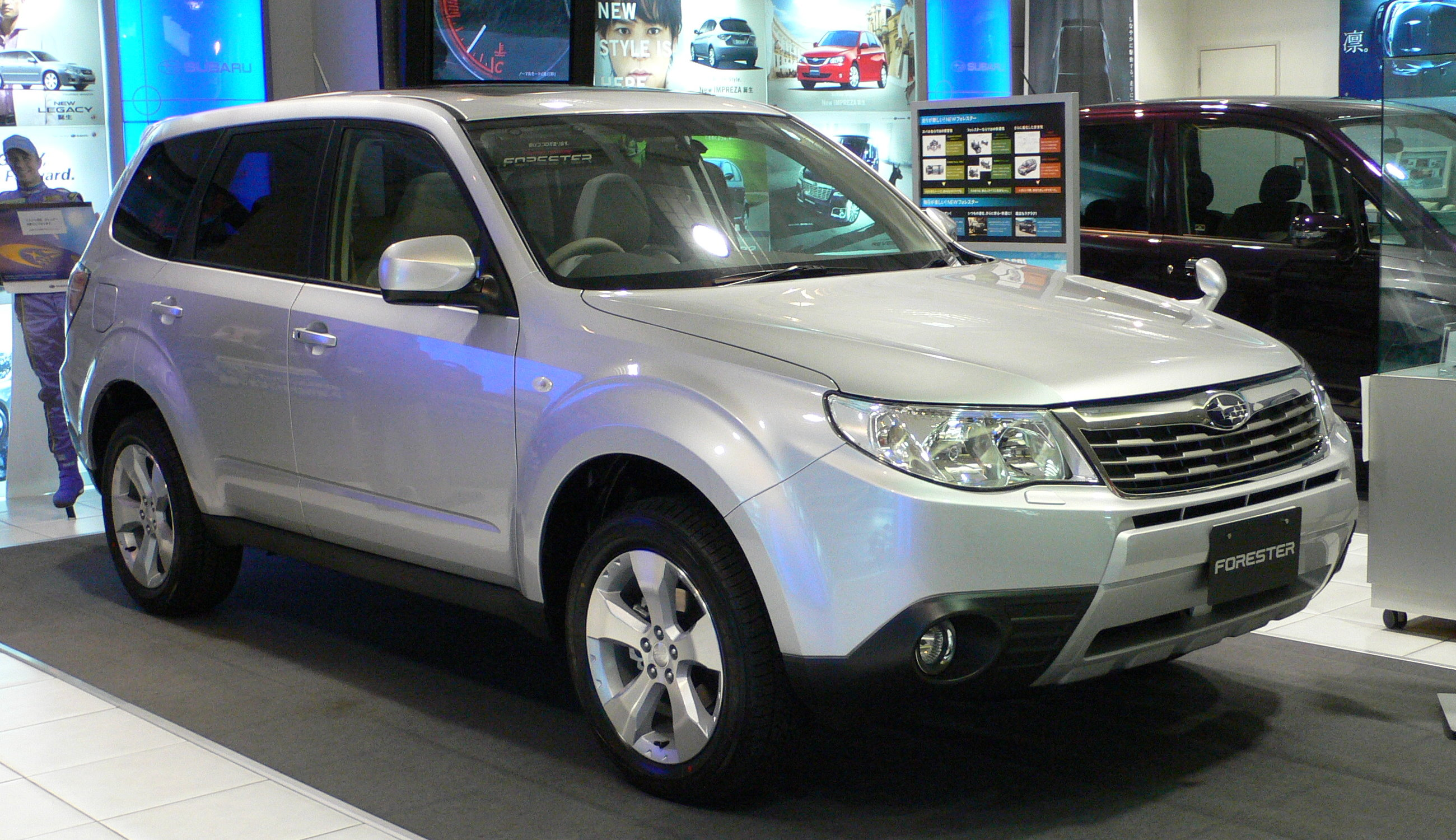 3rd generation Subaru Forester (2007/12 - )